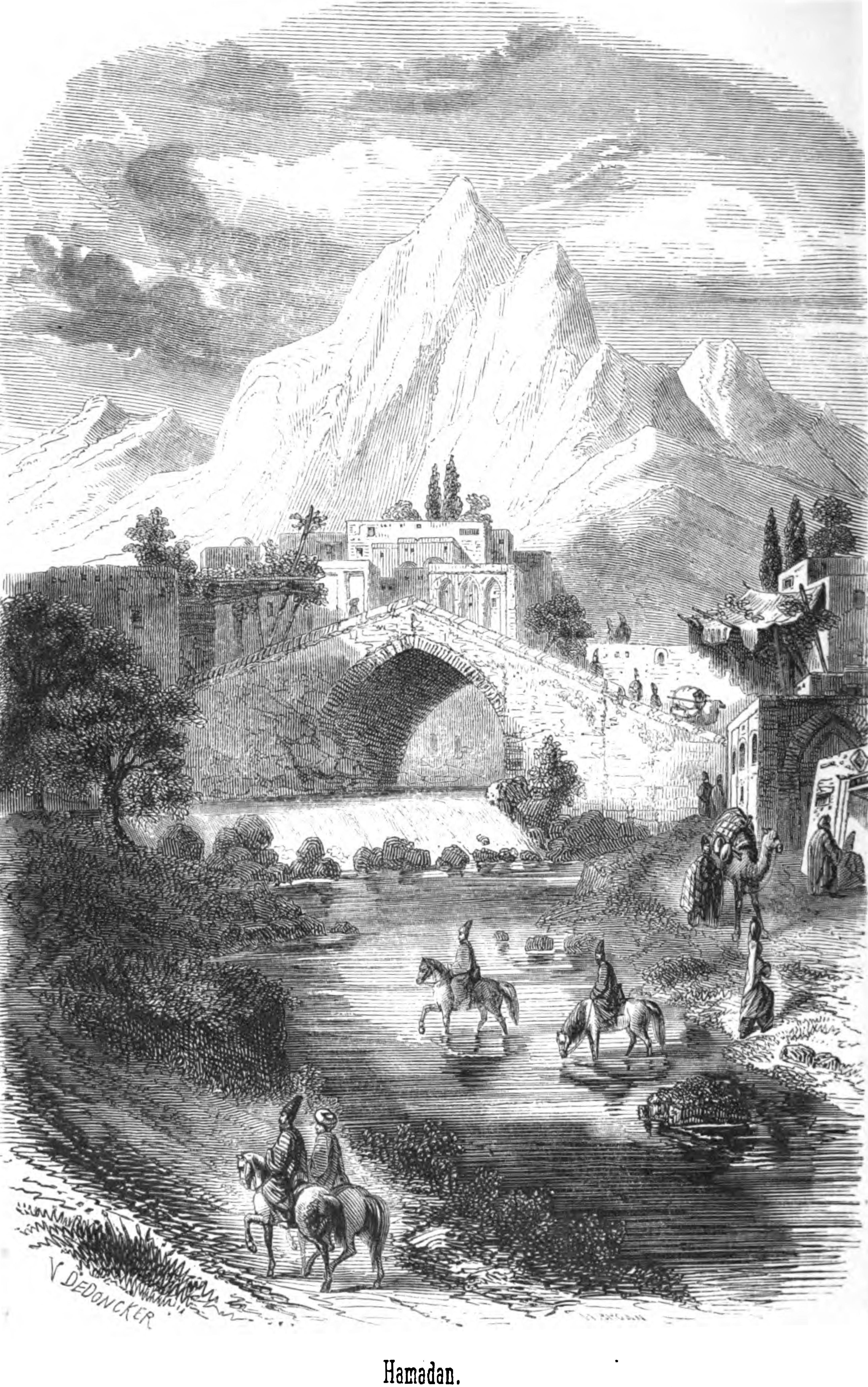 Hamadan. Adolphe Laurent Joanne, Voyage en Orient, Volumes 1-2